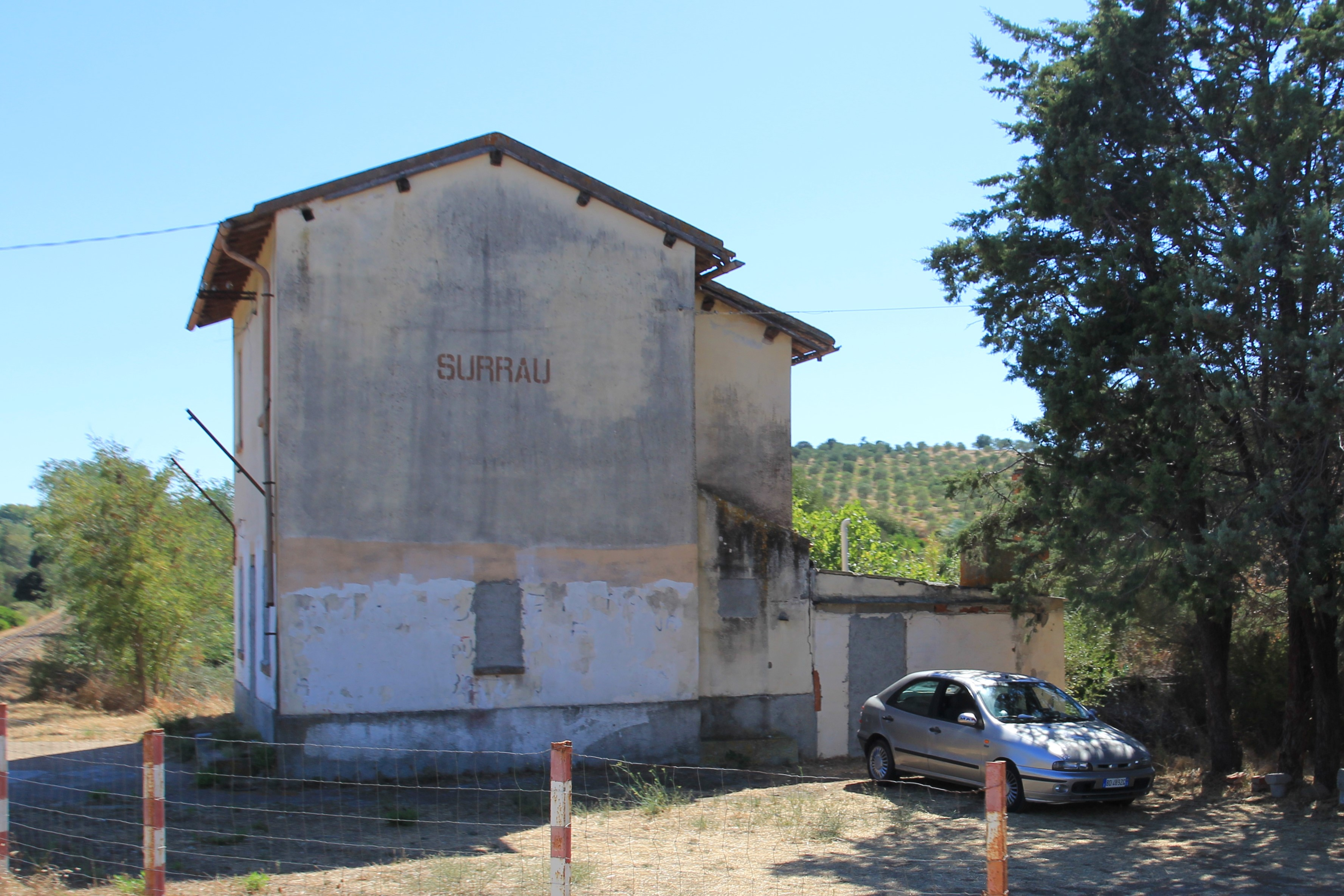 Arzachena, stazione ferroviaria di Surrau